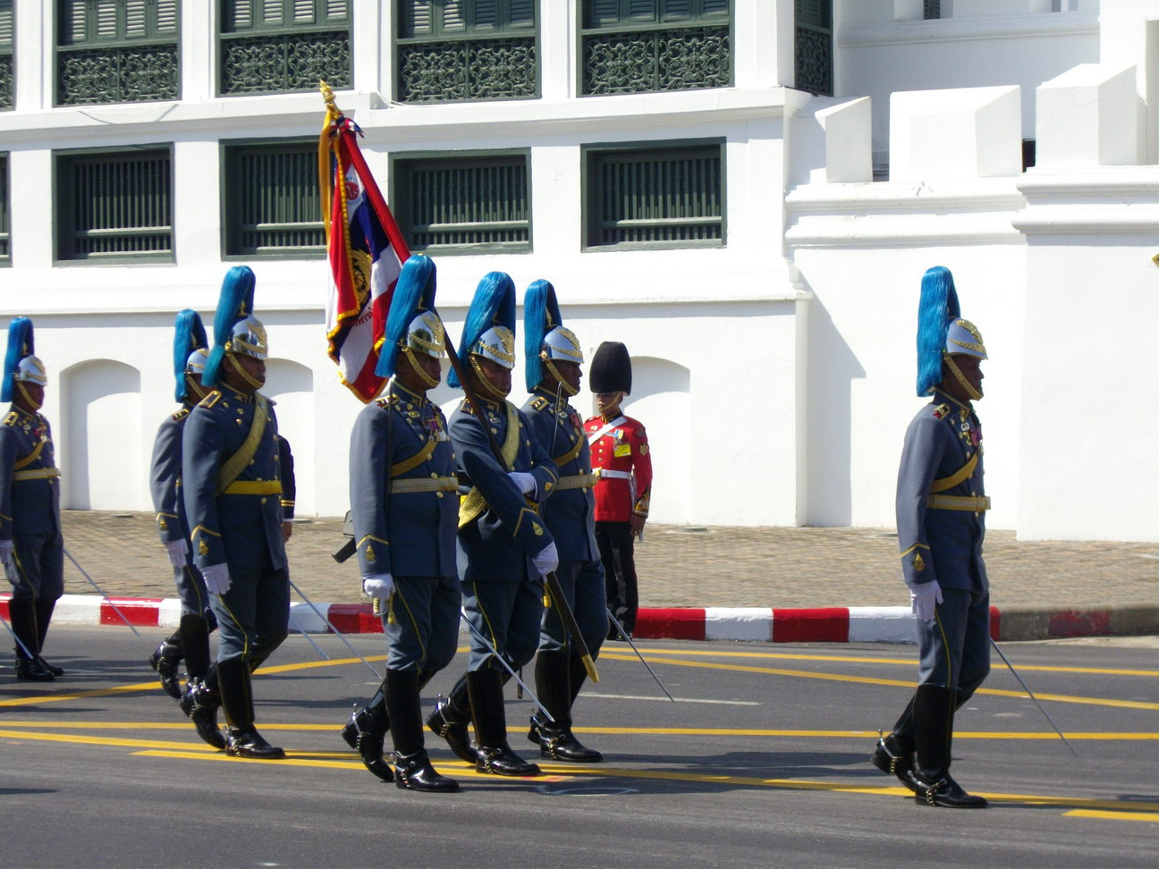 หมู่เชิญธงชัยเฉลิมพลของกองพันทหารม้าที่ 1 รักษาพระองค์ ในริ้วกระบวนเชิญพระศพสมเด็จพระเจ้าพี่นางเธอ เจ้าฟ้ากัลยานิวัฒนา กรมหลวงนราธิวาสราชนครินทร์ ริ้วกระบวนที่ 2 หน้าพระที่นั่งสุทไธสวรรยปราสาท ถนนสนามไชย วันที่ 15 พฤศจิกายน พ.ศ. 2551